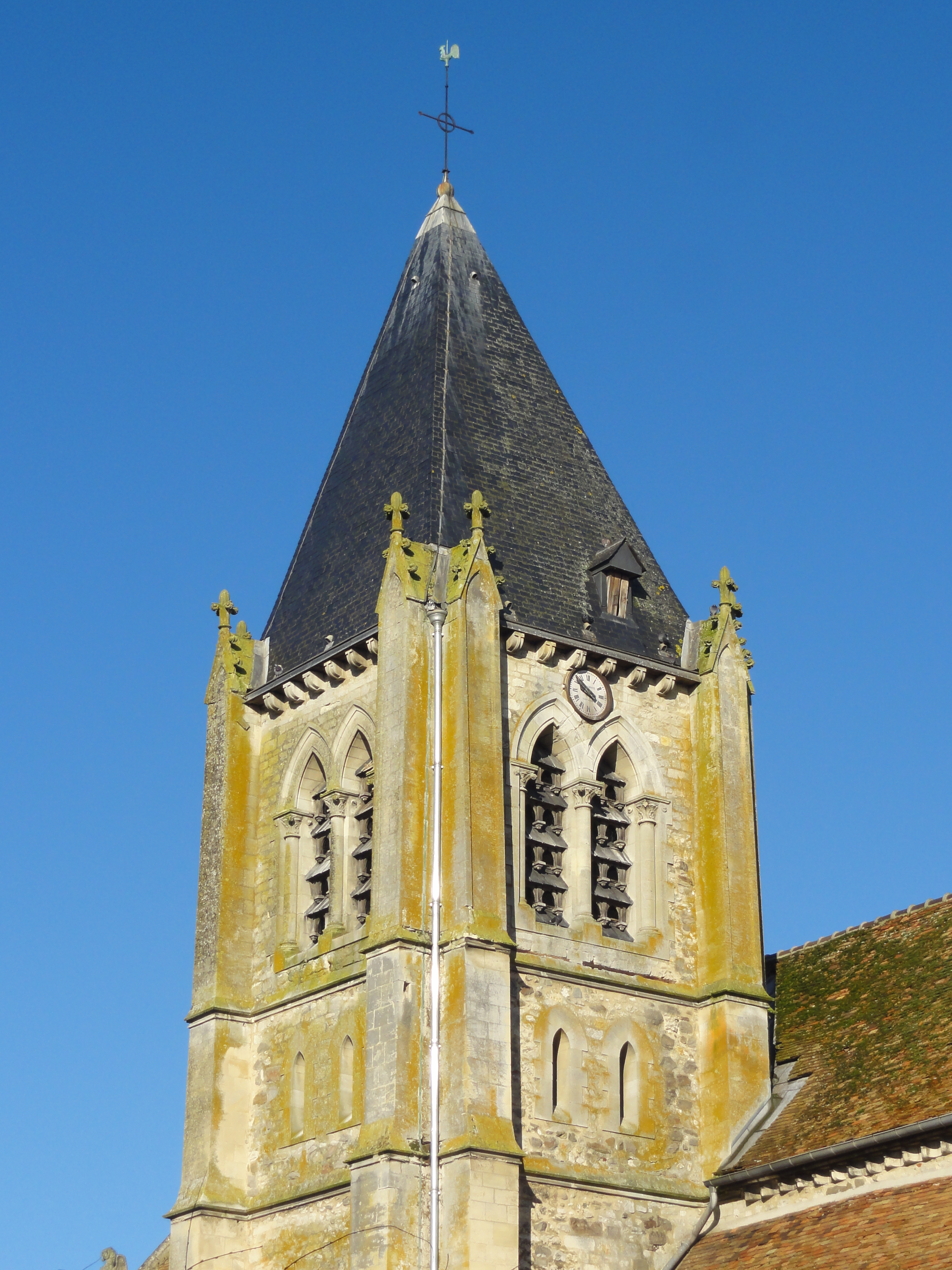 Voir titre.